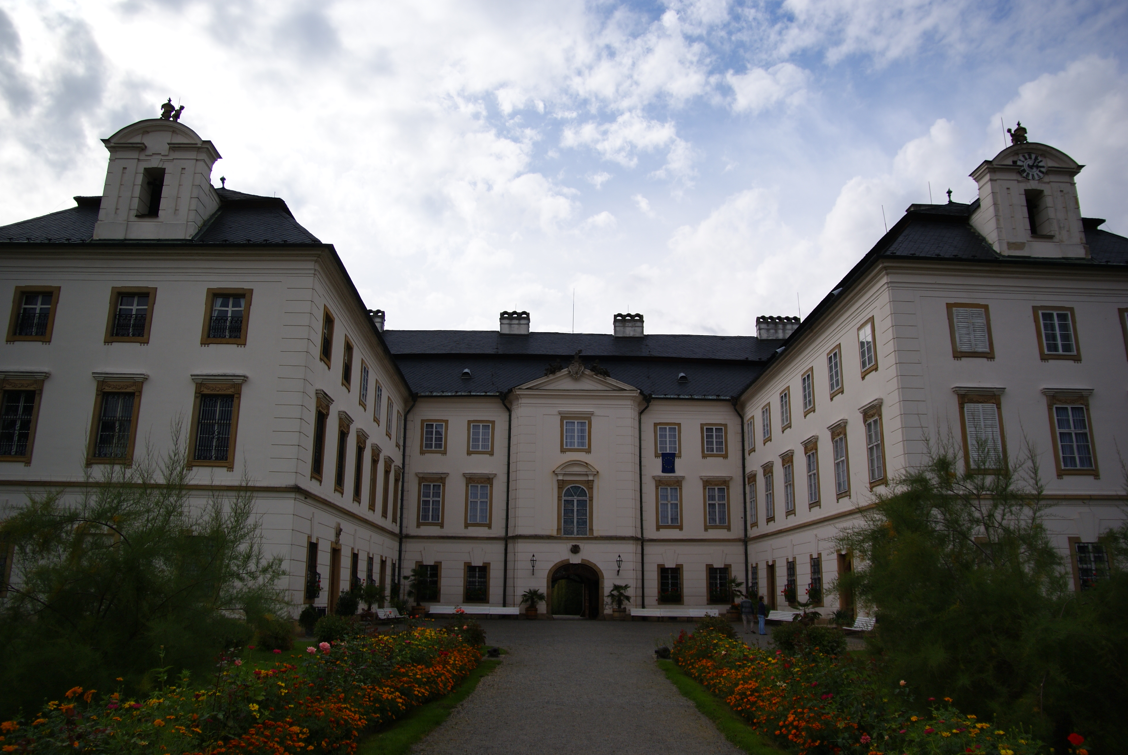 Zámek Vizovice Vizovice, nám. Palackého 376, Vizovice